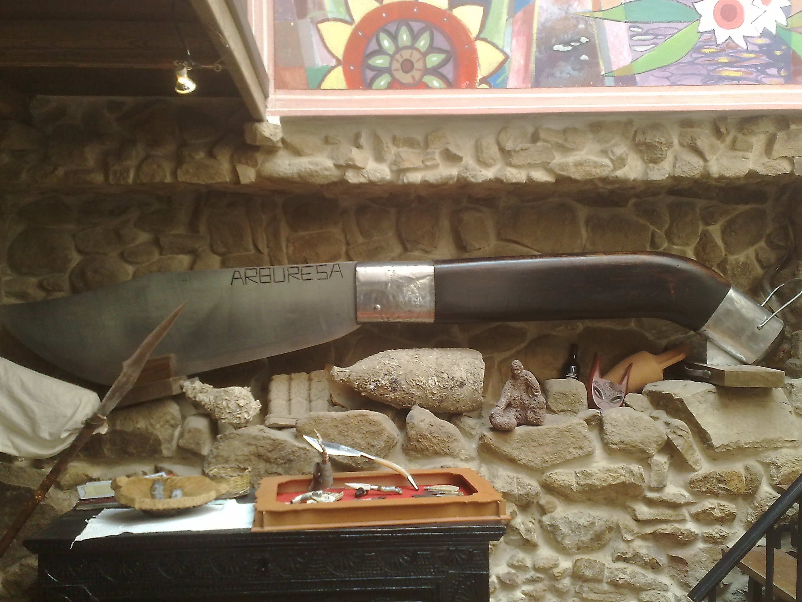 Foto del Coltello Arburesa, Guinness dei primati 1986 (Museo del Coltello, Arbus)